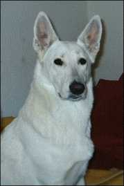 Schweizer Weisser Schäferhund